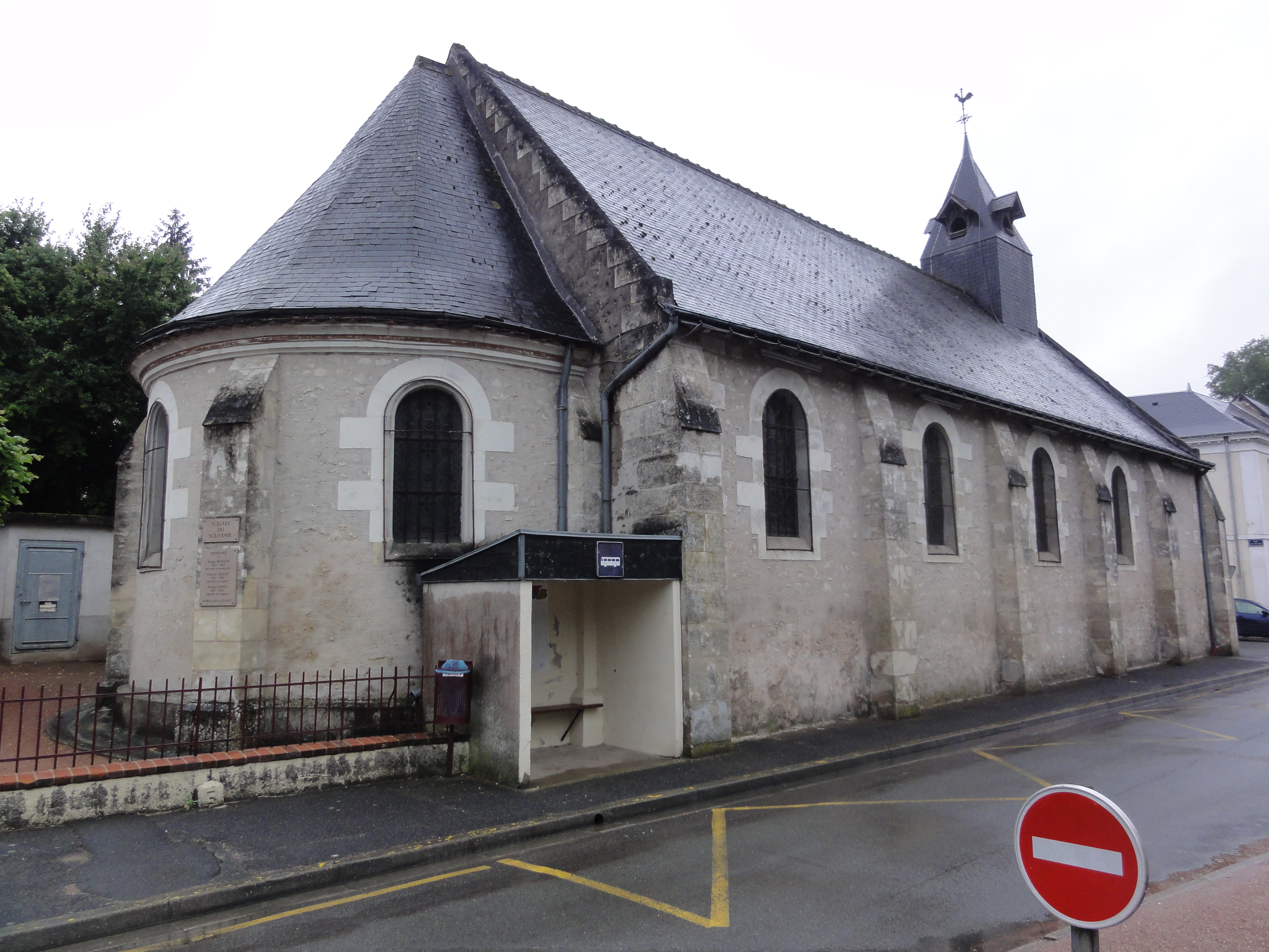 Lussault-sur-Loire (Indre-et-Loire) Église Saint-Etienne